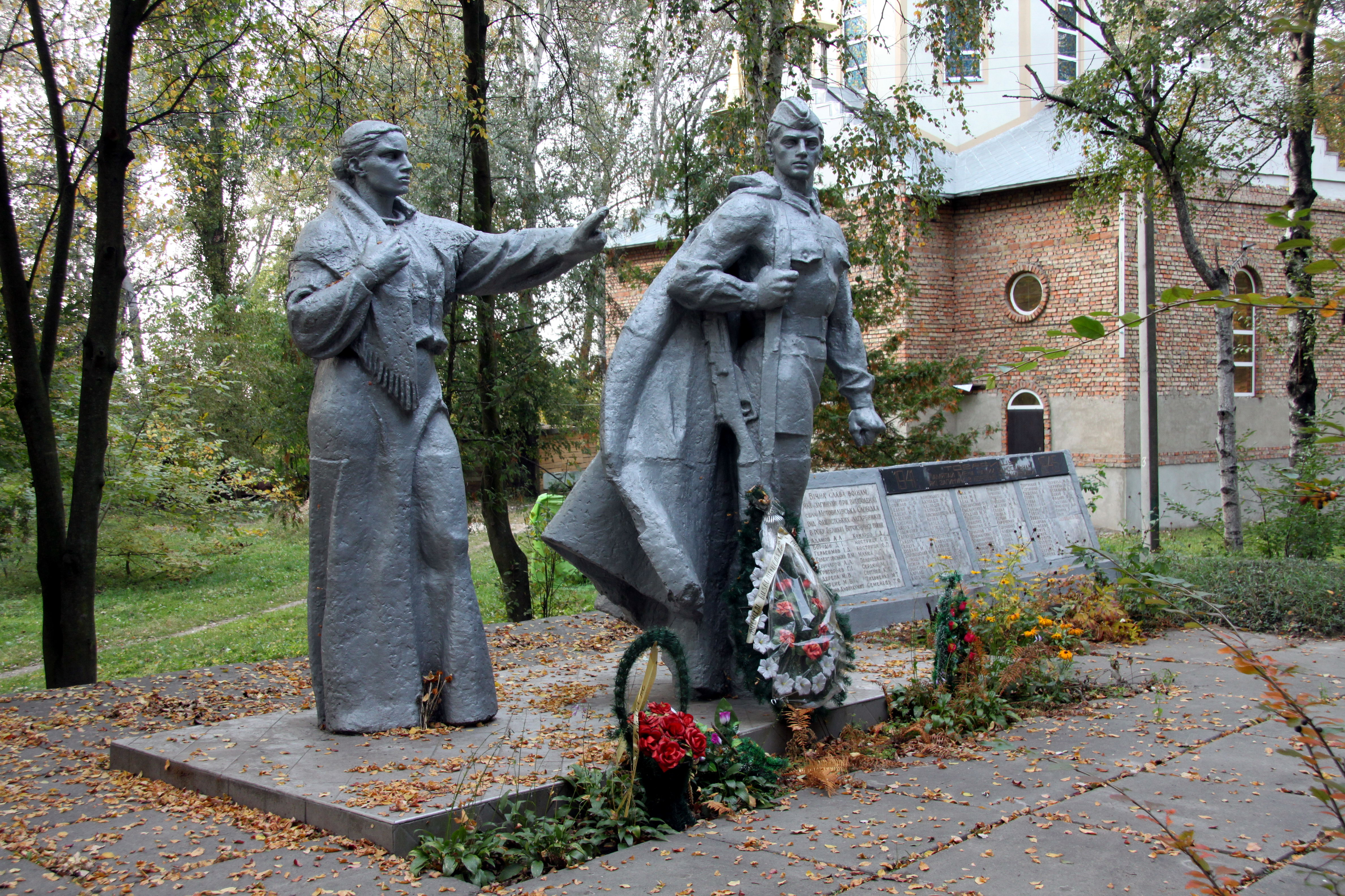 Пам'ятник воїнам-визволителям та односельчанам, центр села, село Мотовилівська Слобідка